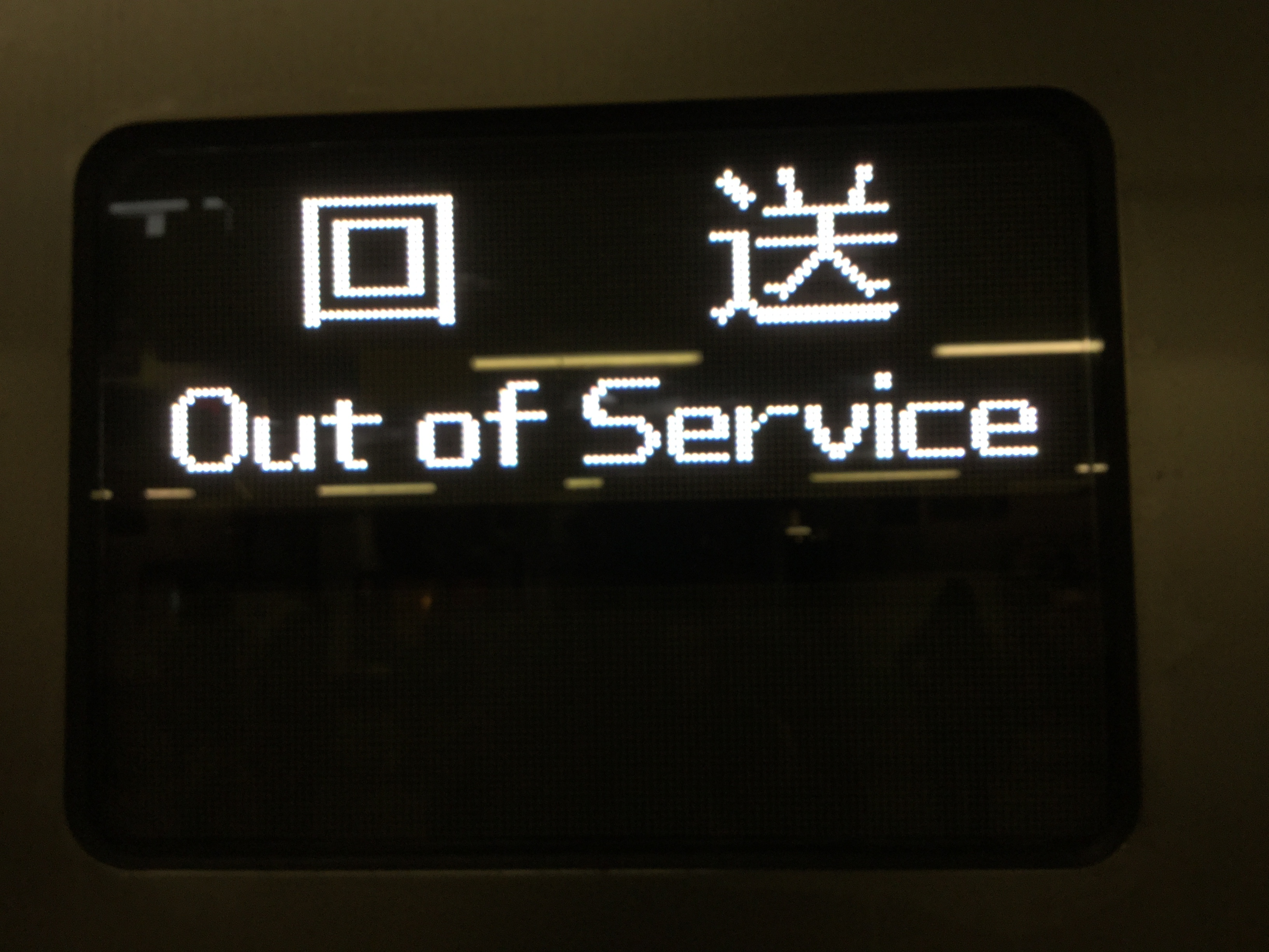 2016年11月19日